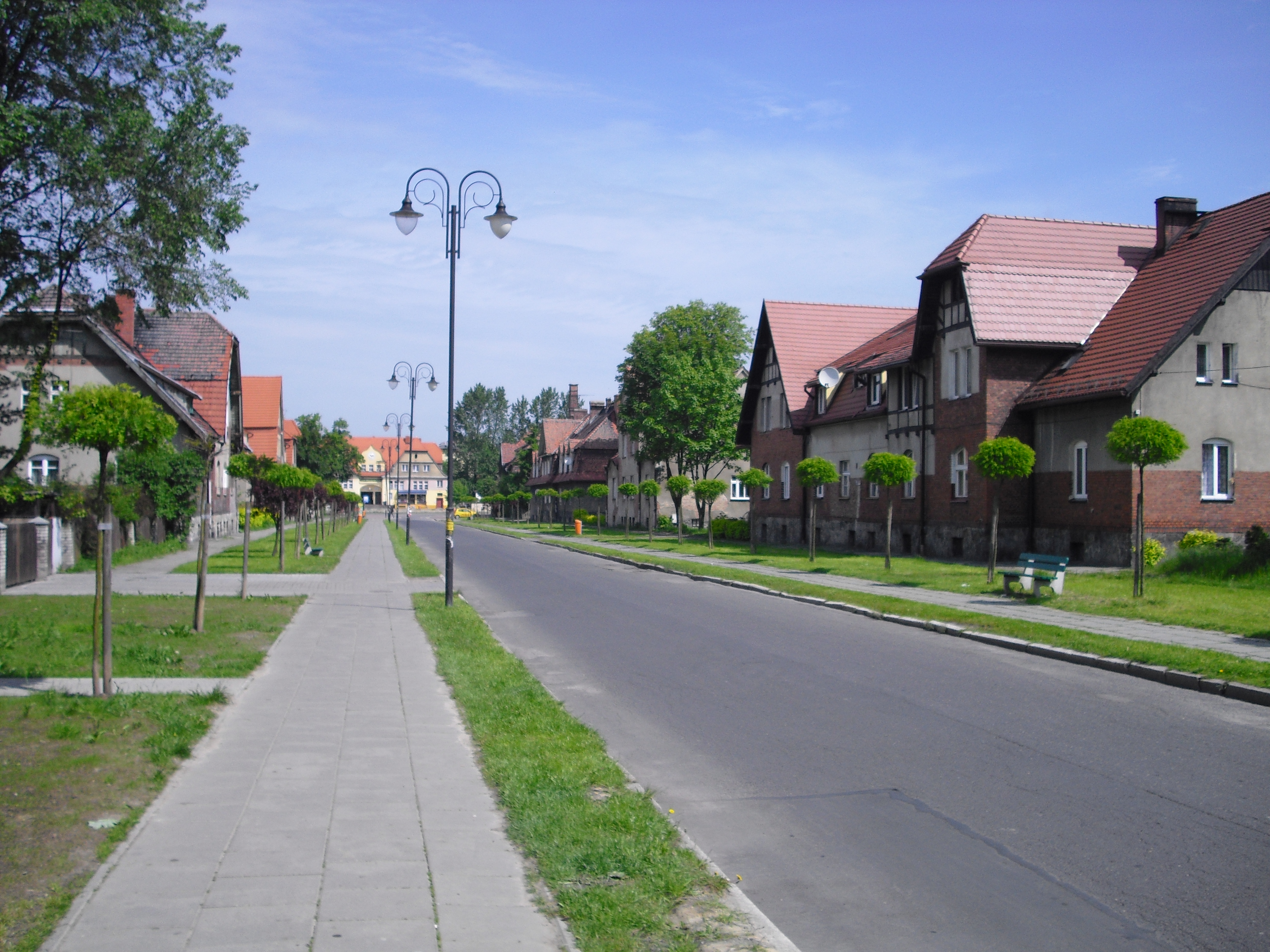 Murcki, zabudowa z początków XX wieku (ok. 1906)